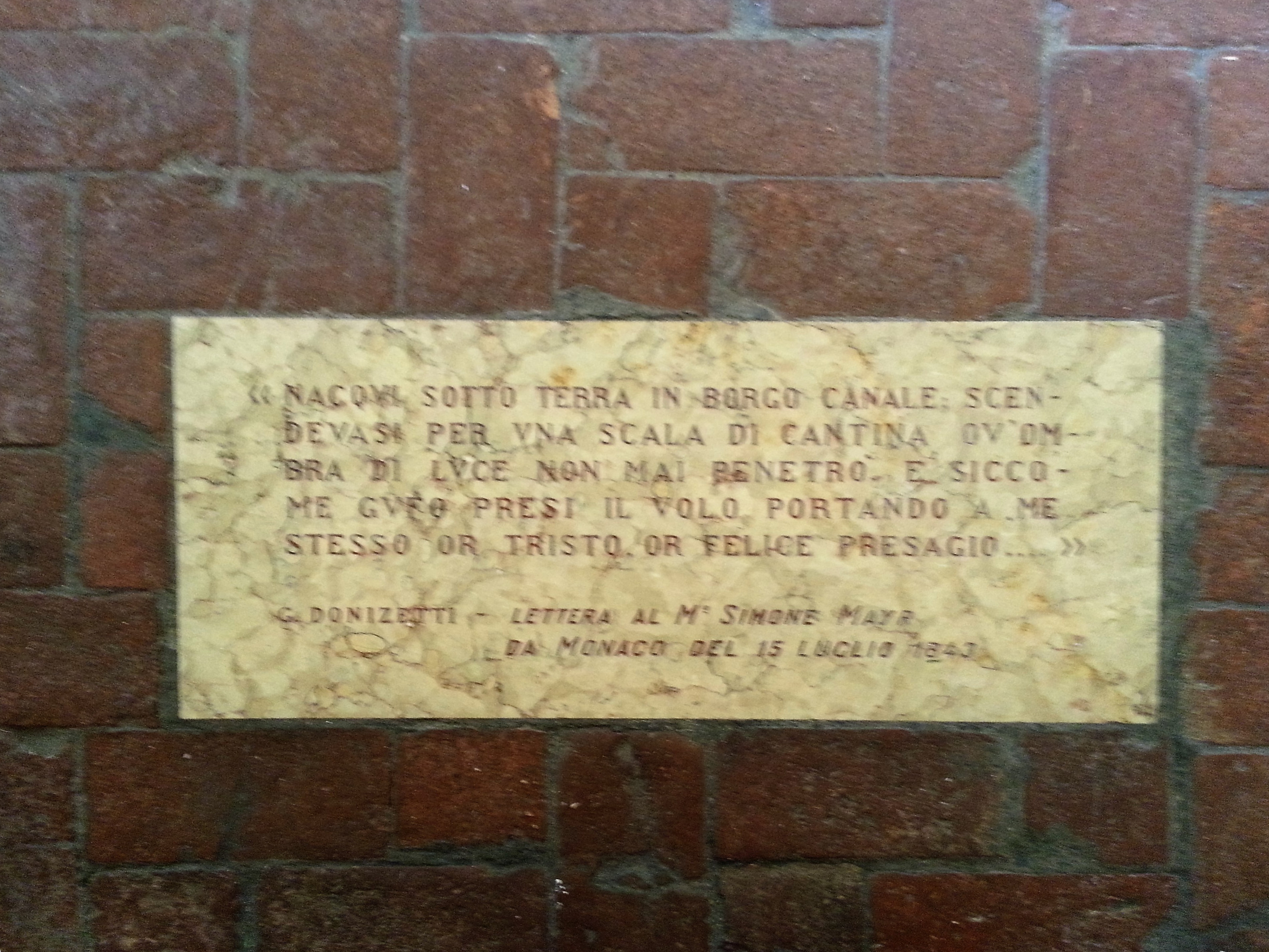 Epigrafe sul pavimento della casa natale di Gaetano Donizetti in via Borgo Canale.